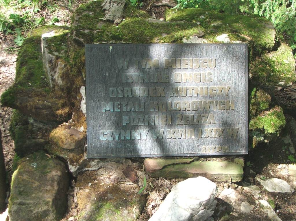 polana Stare Kościeliska (tabliczka upamiętniająca hutnictwo żelaza w Dolinie Kościeliskiej)